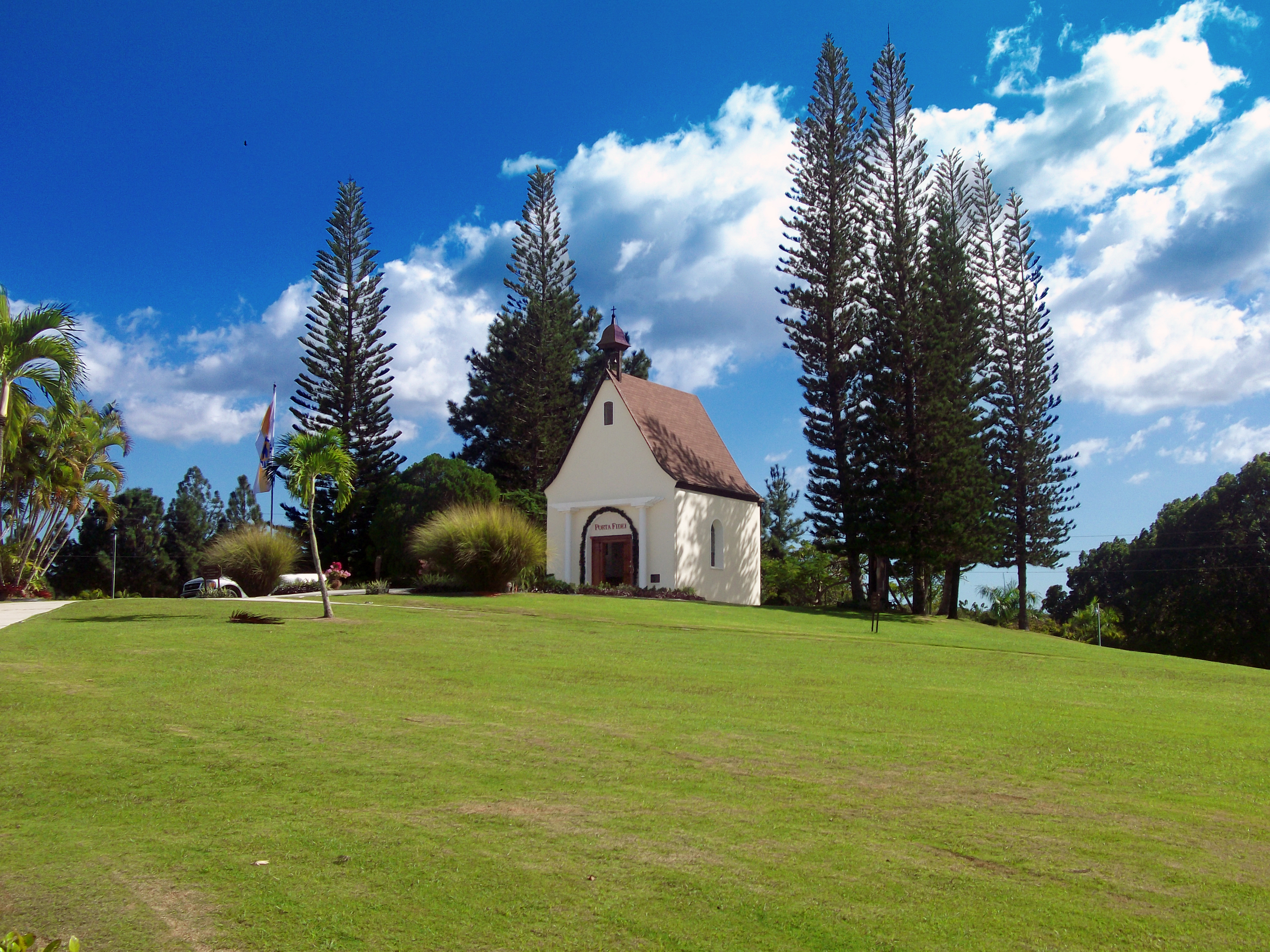 Santuario Schoenstatt